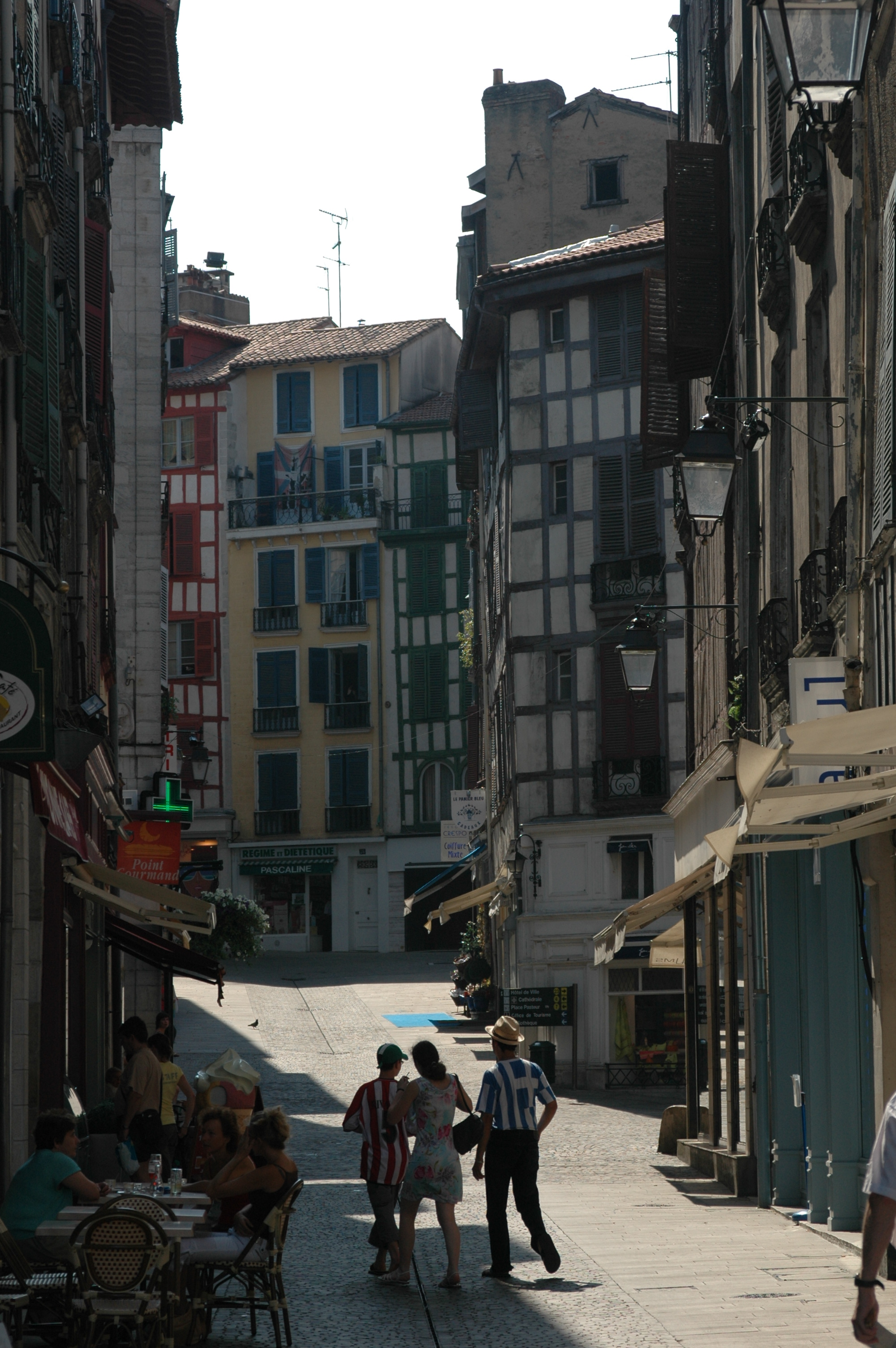 Bayonne, rue de l'Argenterie. Photo prise le 10/07/06 par Harrieta171